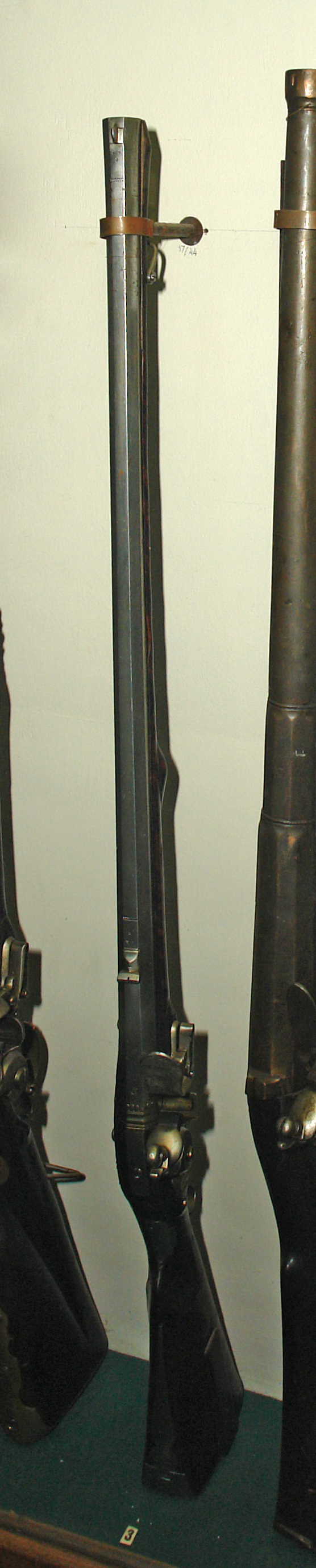 Штуцер пехотный 1720 г. Калибр —15,2 мм. Длина ствол 753 мм. Длина штуцера — 1114 мм. Масса —3,9 кг. Изготовлен в 1721 г. на Тульском оружейном заводе в качестве эталона.